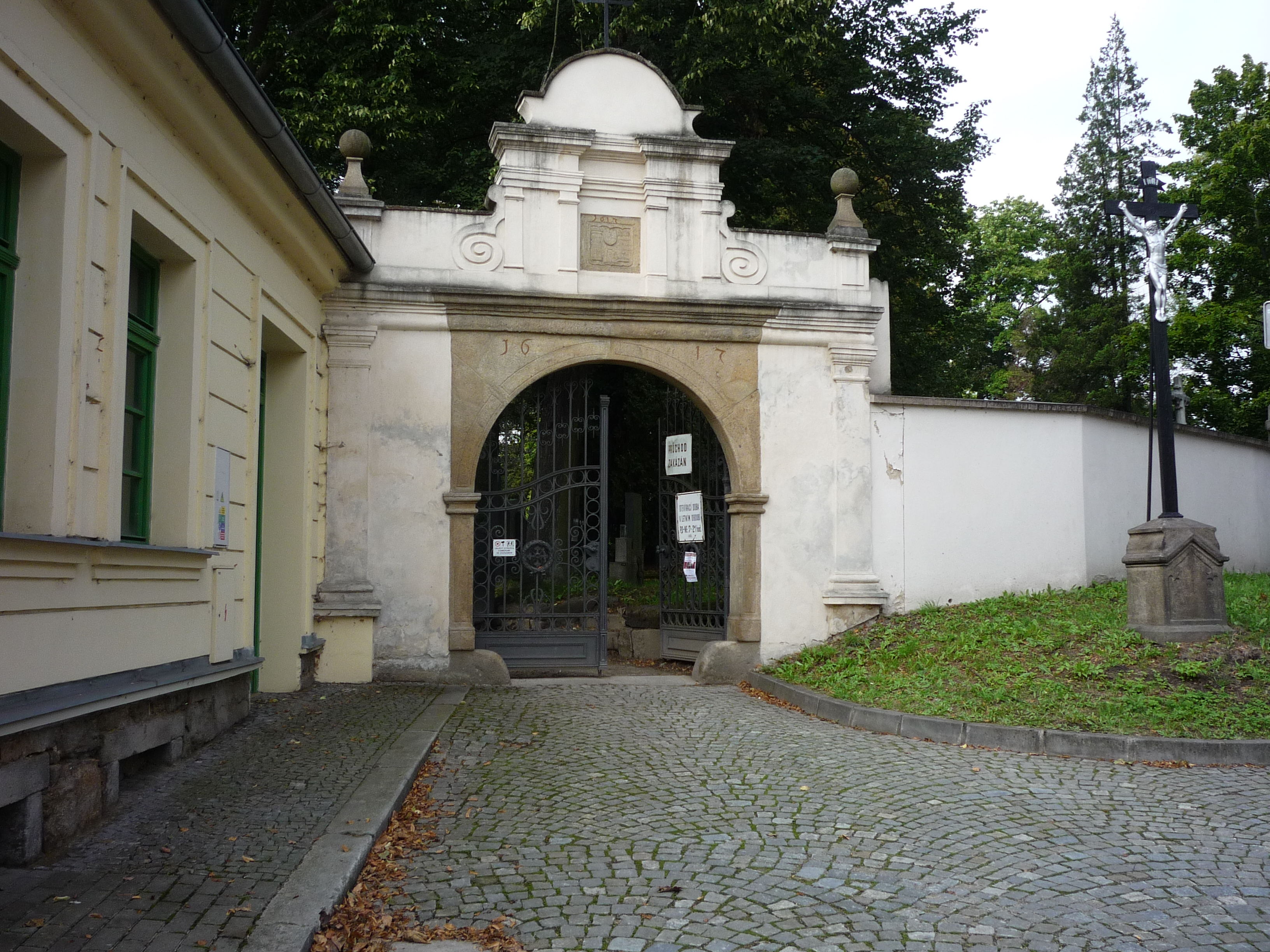 Fotografie autor Jiří Zelenka. Ze dne 12 září 2015. Fotografováno při příležitosti DNY EVROPSKÉHO DĚDICTVÍ v Havlíčkově Brodě.